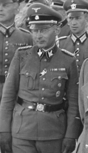 Besuch des Reichsleiters Rosenberg in Kiew